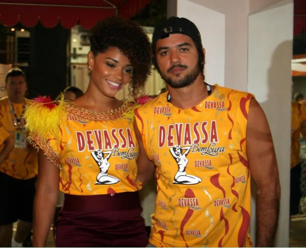 Atriz Juliana Alves curtiu os desfiles do 1º dia no camarote de uma cervejaria com o namorado, e também ator, Guilherme Duarte.